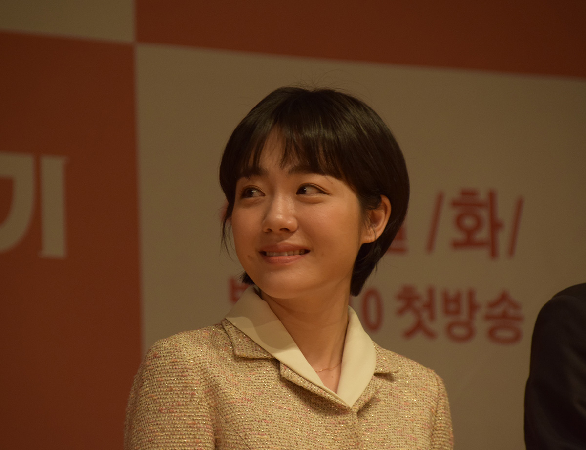 소주연 KBS 2TV 오피스드라마 '회사가기싫어' 제작발표회 (2019.4.8)